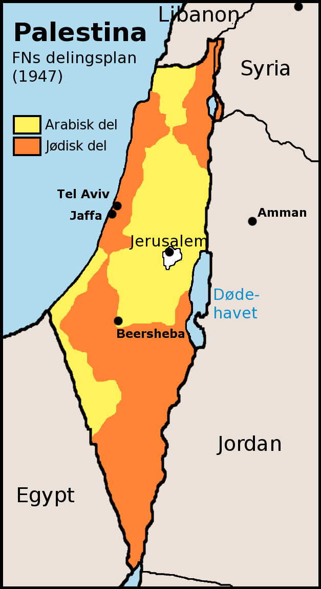 FNs delingsplan for Palestina, 1947